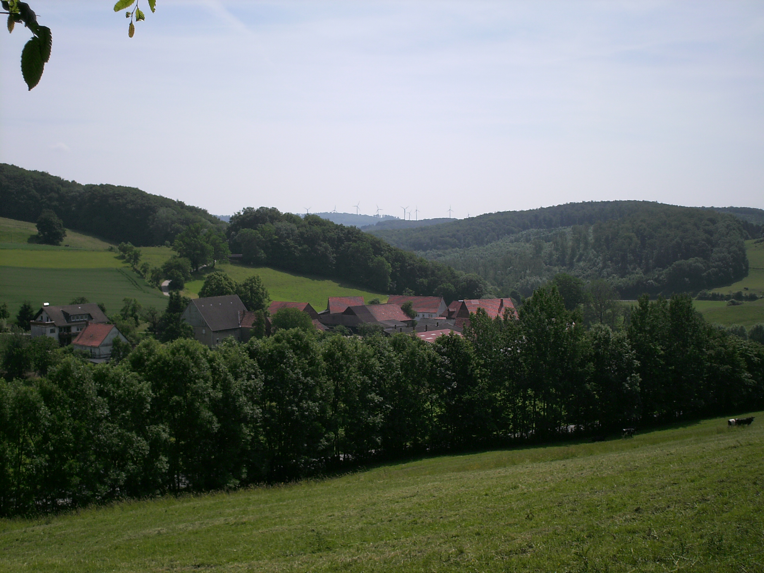 Ein Blick auf Hohenbreden